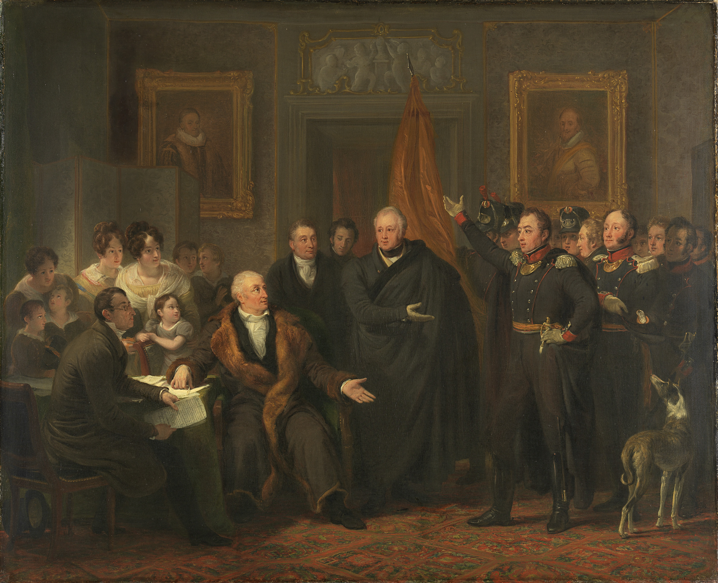 De aanvaarding van het Hoog Bewind door het Driemanschap in naam van de prins van Oranje op 21 november 1813 ten huize van Gijsbert Karel van Hogendorp, zittend rechts van de tafel. Achter hem staat Van der Duyn van Maasdam en naast hem staat, wijzend naar de officieren, Graaf van Limburg Stirum. Rechts staat met opgeheven hand kolonel Van Oldebarnevelt, genaamd Witte Tullingh, achter hem kapitien Van Heynsbergen. Zittend links aan tafel is Elias Canneman, achter hem vrouwen met kinderen. Aan de wand twee schilderijen met portretten van Willem van Oranje en Maurits.